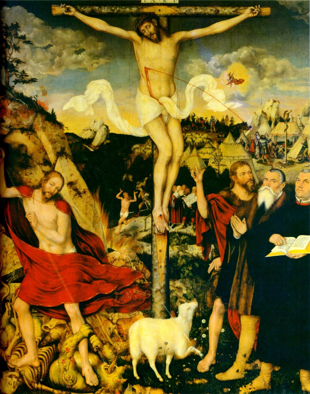 Mitteltafel des Altars der Peter- und Paulkirche in Weimar